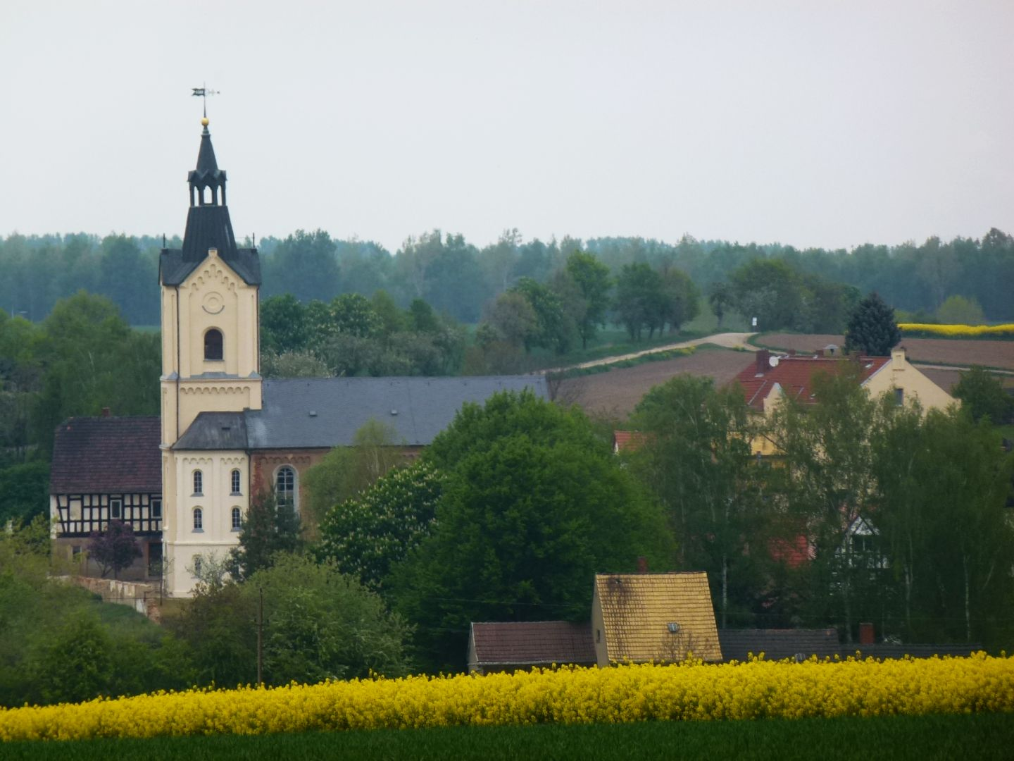 Blick auf Großröda